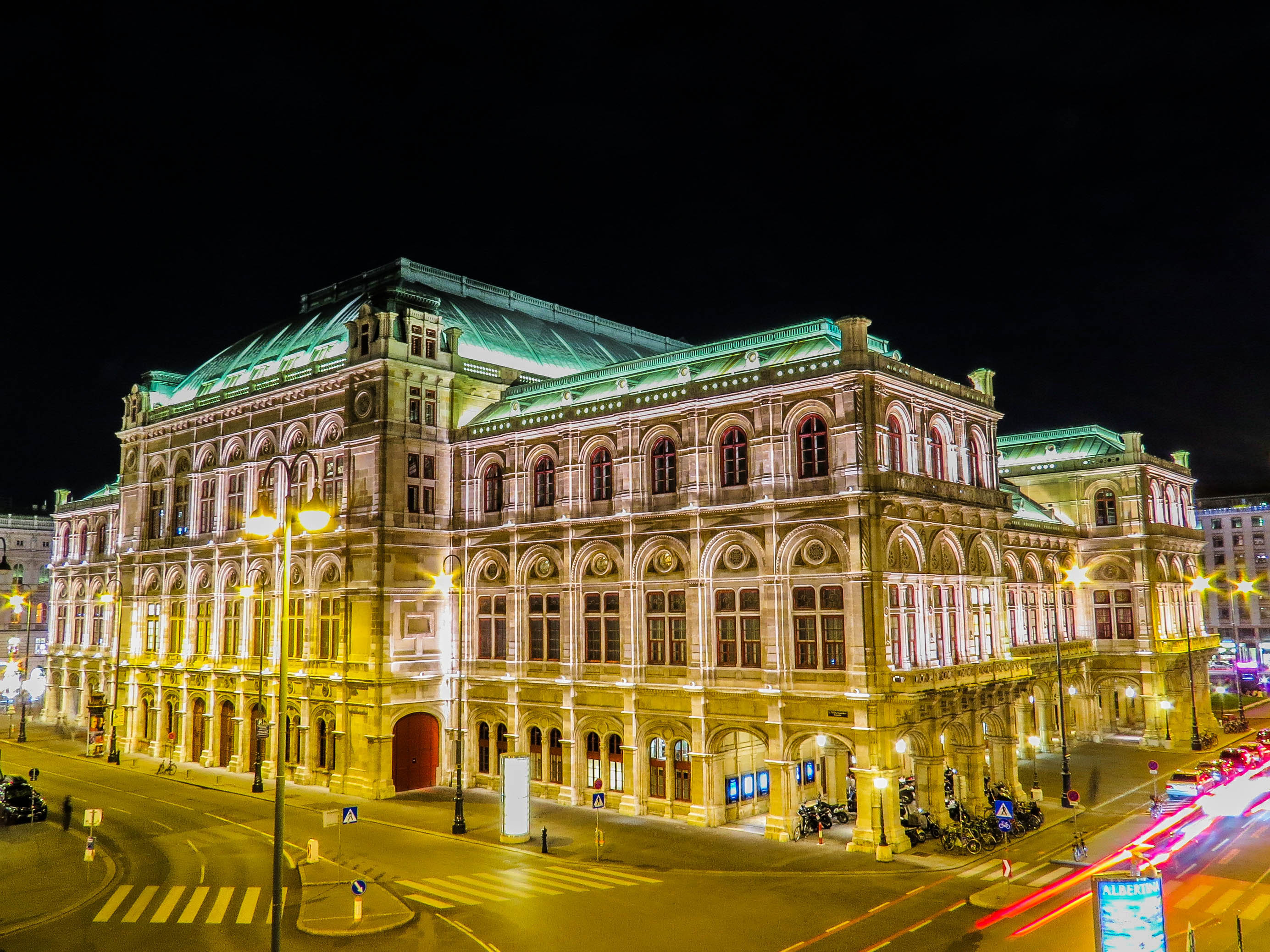 Wiener Staatsoper